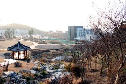 단국대학교 인공폭포(죽전)